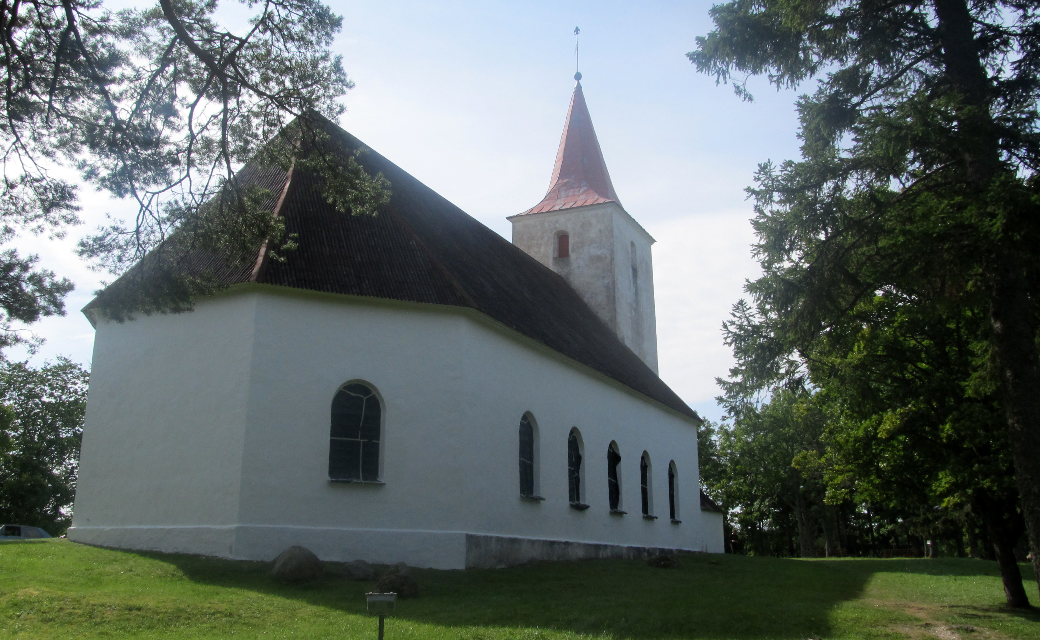 Reigi kirik